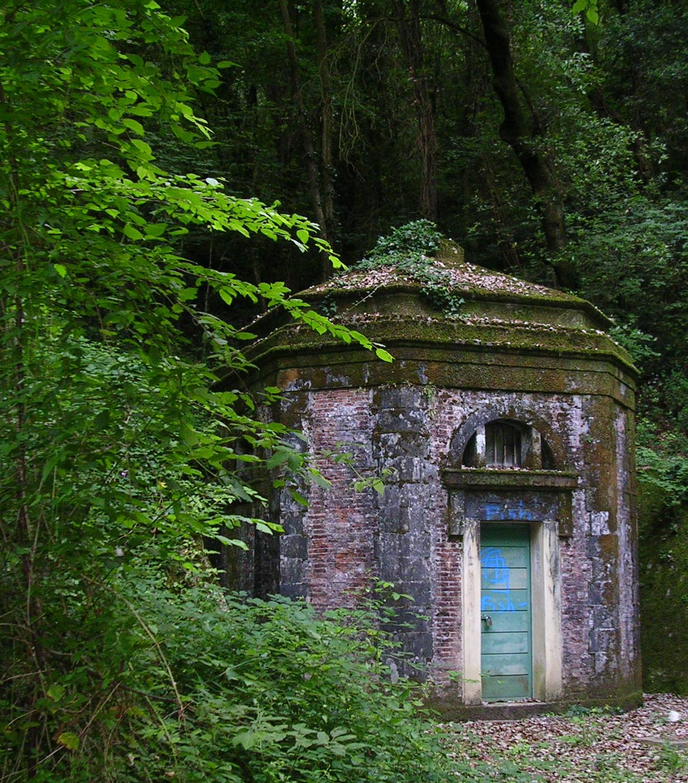 Colognole: sorgenti dell'Acquedotto di Colognole (Collesalvetti): l'acquedotto, costruito tra la fine del XVIII e la seconda metà del XIX secolo, ha rappresentato la principale risorsa idrica per la città di Livorno fino ai primi anni del Novecento.